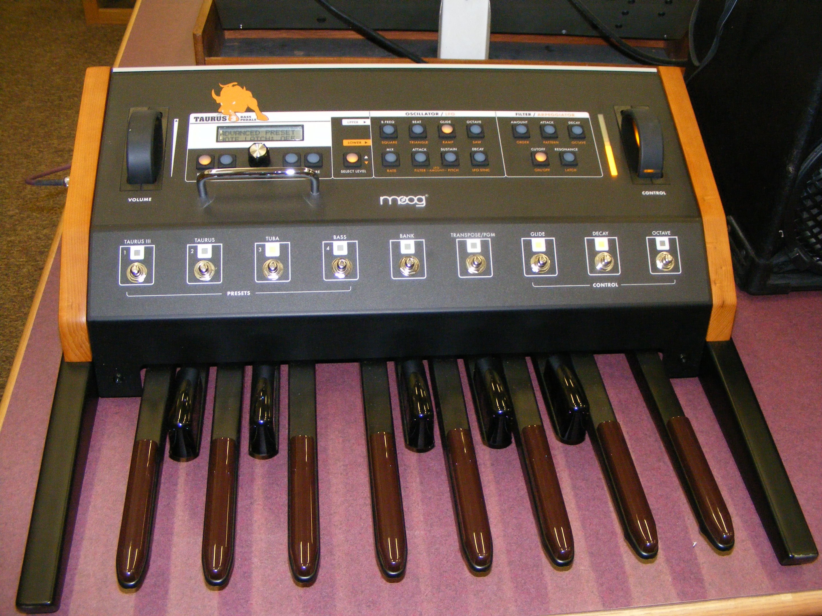 Taurus III Pedals